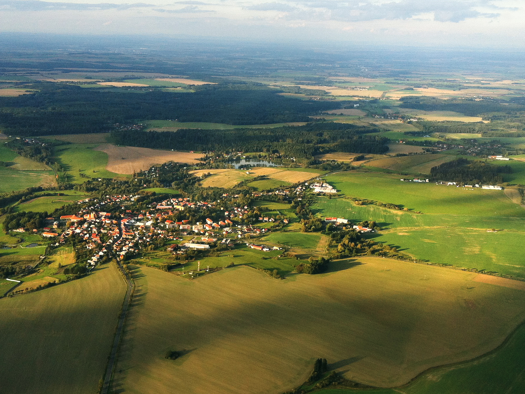 Letecký pohled na Vnitrostátní veřejné letiště Zbraslavice LKZB a obec Zbraslavice